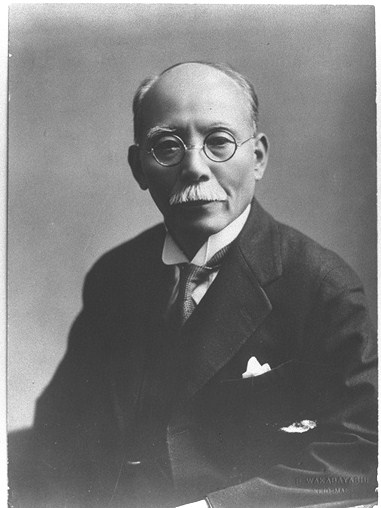 林毅陸（明治5年(1872)5月1日生、昭和25年(1950)12月17日没。）明治25年(1892)7月慶應義塾正科卒業、明治28年(1895)12月慶應義塾大学部文学科卒業、明治34年(1901)義塾留学生としてヨーロッパ留学。政治科教授「外交史」「比較憲法」等担当、大正8年(1919)法学博士、大正12年(1923)11月-昭和8年(1933)11月慶應義塾塾長。貴族院議員勅選、愛知大学長、帝国学士院会員。